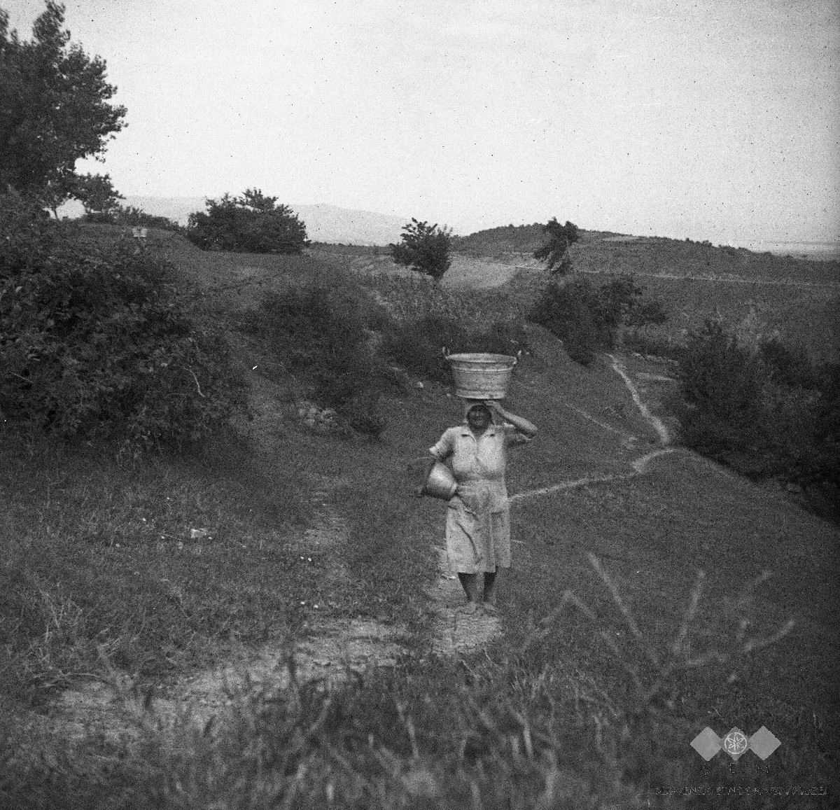 Ženska z golido vode, Lopar.